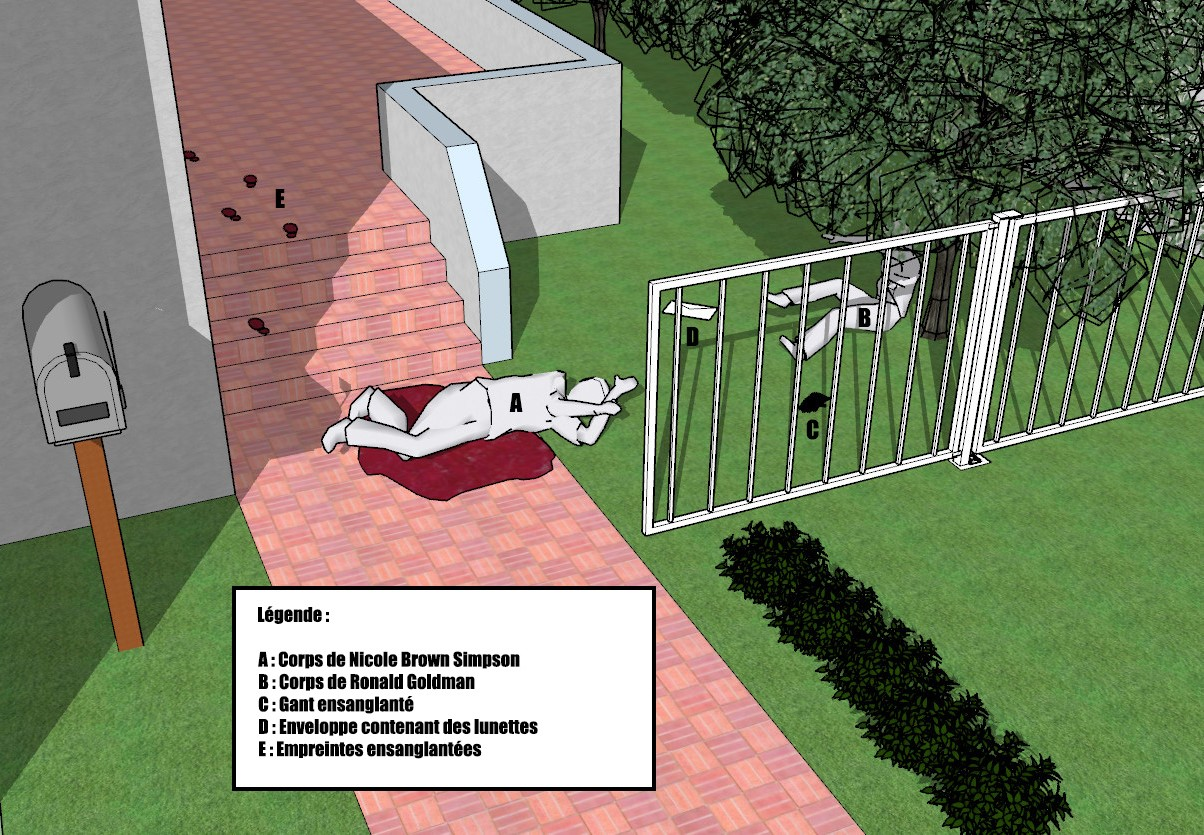 Représentation de la scène de crime et des principaux éléments de l'enquête trouvés sur place.